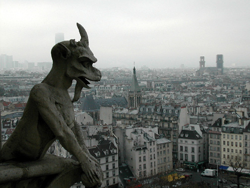 Notre Dame "gargoyle". Paris 2002. - Galerie des Chimères